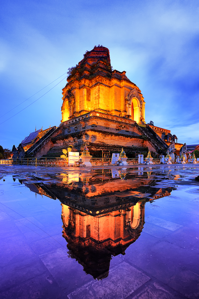 วัดเจดีย์หลวง เชียงใหม่ วัดเจดีย์หลวงวรวิหาร เป็นวัดเก่าแก่ในจังหวัดเชียงใหม่ มีชื่อเรียกหลายชื่อ ได้แก่ ราชกุฏาคาร วัดโชติการาม สร้างขึ้นในรัชสมัยของพระเจ้าแสนเมืองมา กษัตริย์ลำดับที่ 7 แห่งราชวงศ์มังราย ไม่ปรากฏปีที่สร้างแน่ชัด สันนิษฐานว่าวัดแห่งนี้น่าจะสร้างในปี พ.ศ. 1928-พ.ศ. 1945 วัดเจดีย์หลวงเป็นพระอารามหลวงแบบโบราณ มีการบูรณะมาหลายสมัย โดยเฉพาะพระเจดีย์ ที่ปัจจุบันมีขนาดความกว้างด้านละ 60 เมตร เป็นองค์พระเจดีย์ที่มีความสำคัญที่สุดองค์หนึ่งในเชียงใหม่ วัดเจดีย์หลวงสร้างอยู่กลางใจเมืองเชียงใหม่ ซึ่งแต่เดิมถือว่าเป็นศูนย์กลางทางการปกครองของอาณาจักรล้านนา ตั้งอยู่เลขที่ 103 ถนนพระปกเกล้า ตำบลพระสิงห์ อำเภอเมือง จังหวัดเชียงใหม่ มีเนื้อที่ภายในวัดประมาณ 32 ไร่ 1 งาน 27 ตารางวา ติดตามอ่านเพิ่มเติมได้ที่ ขอขอบคุณข้อมูล : วิกิพีเดีย